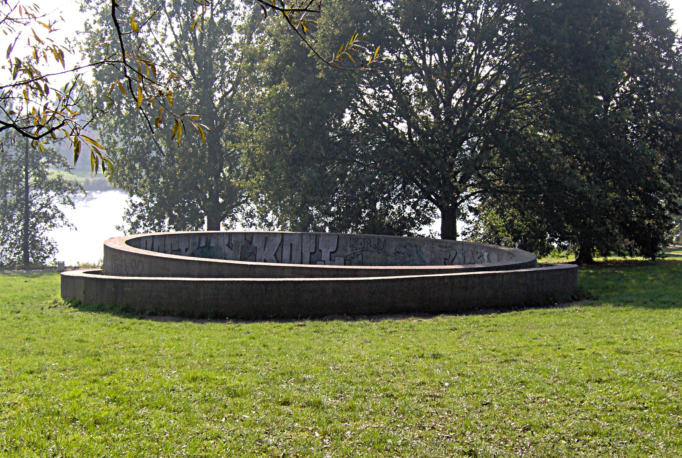 Skulptur ohne Titel von Donald Judd in Münster.